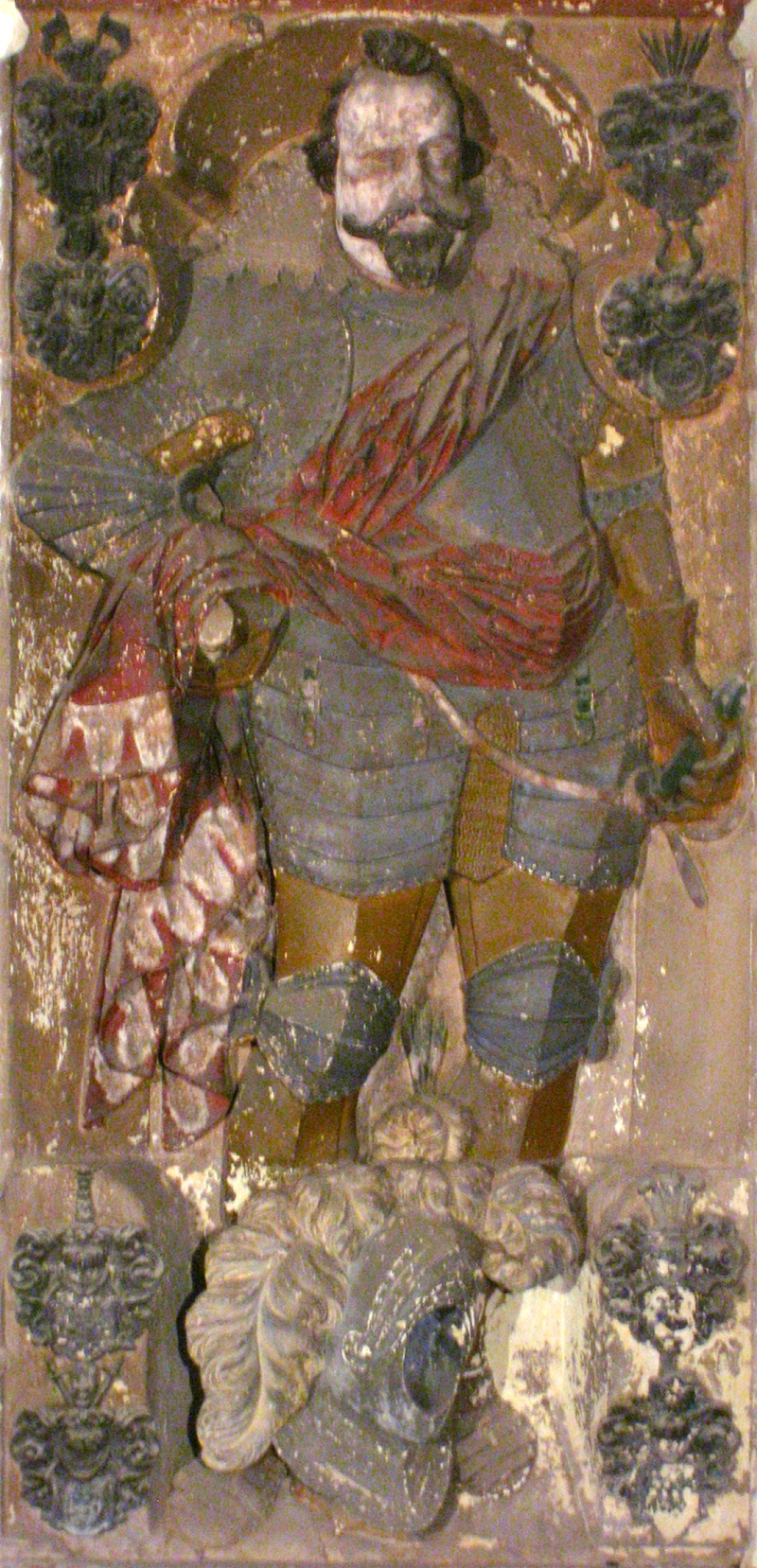 Epitaph des Antonius von Randow